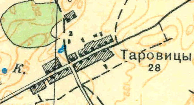 Топографическая карта Ленинградской области, квадрат О-35-24-Б-в (Вохоново), деревня Таровицы